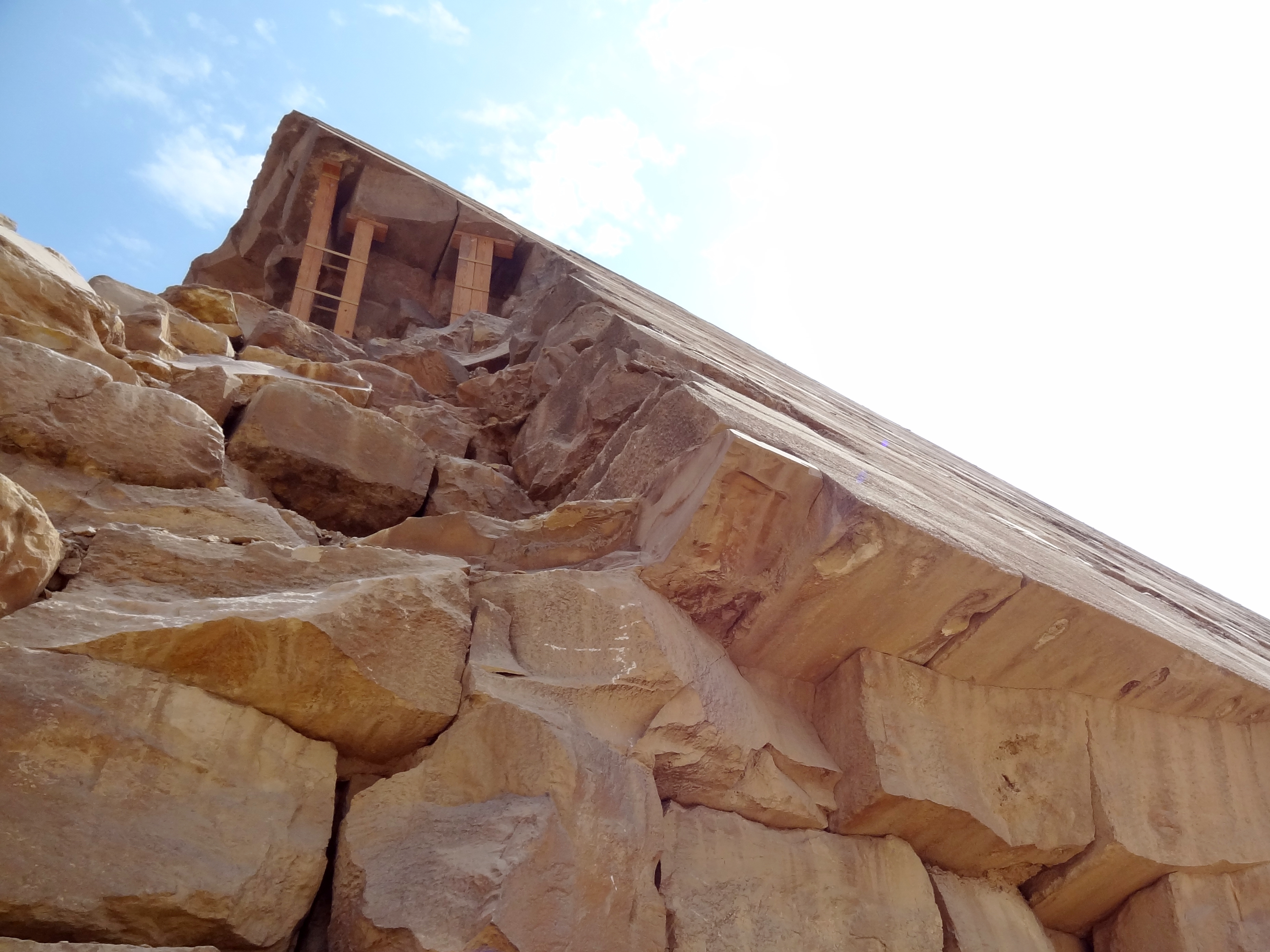 Knickpyramide von Dahschur, Ägypten